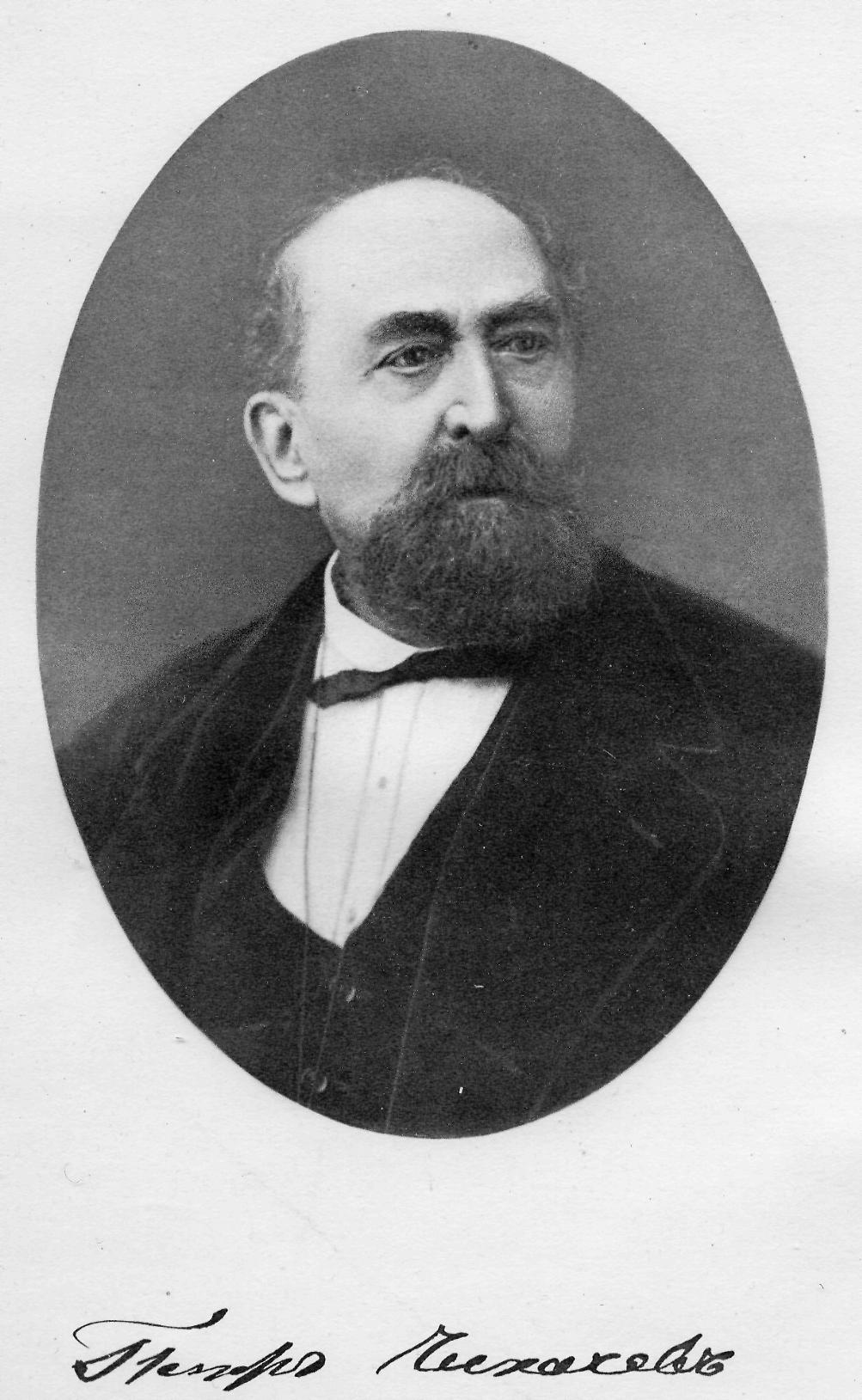 Чихачёв Петр Александрович (1808–1890)